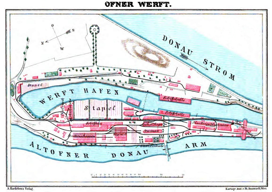 Plan des 1835 gegründeten Winterhafens samt Werft in Alt-Ofen.Probably Óbuda Island